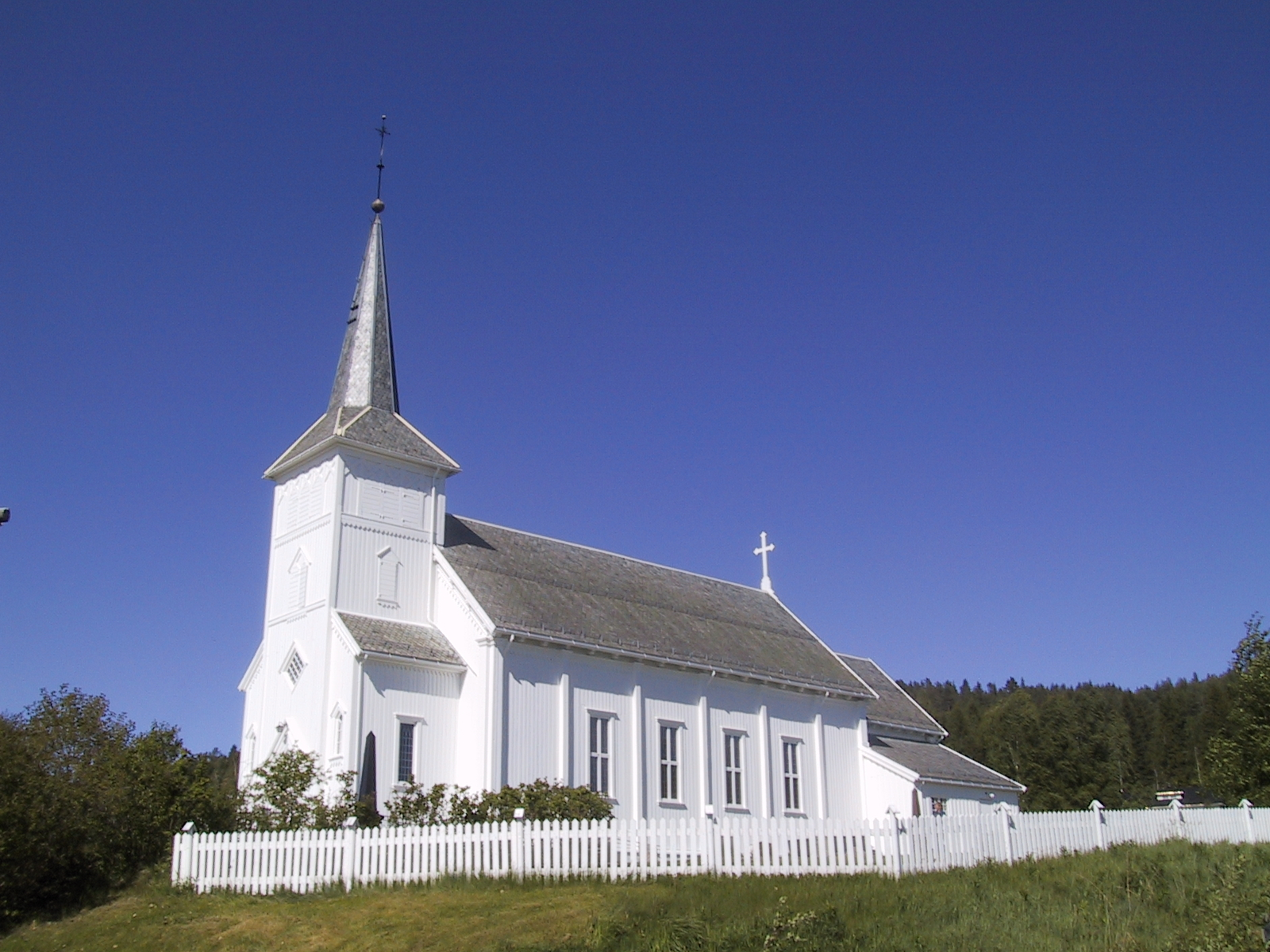 Gjesåsen kirke i Åsnes